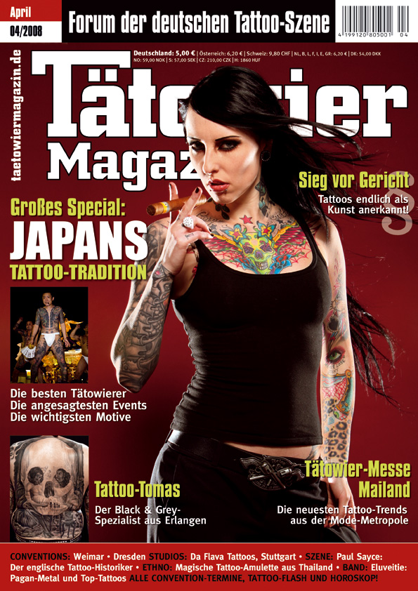 TätowierMagazin 4/08